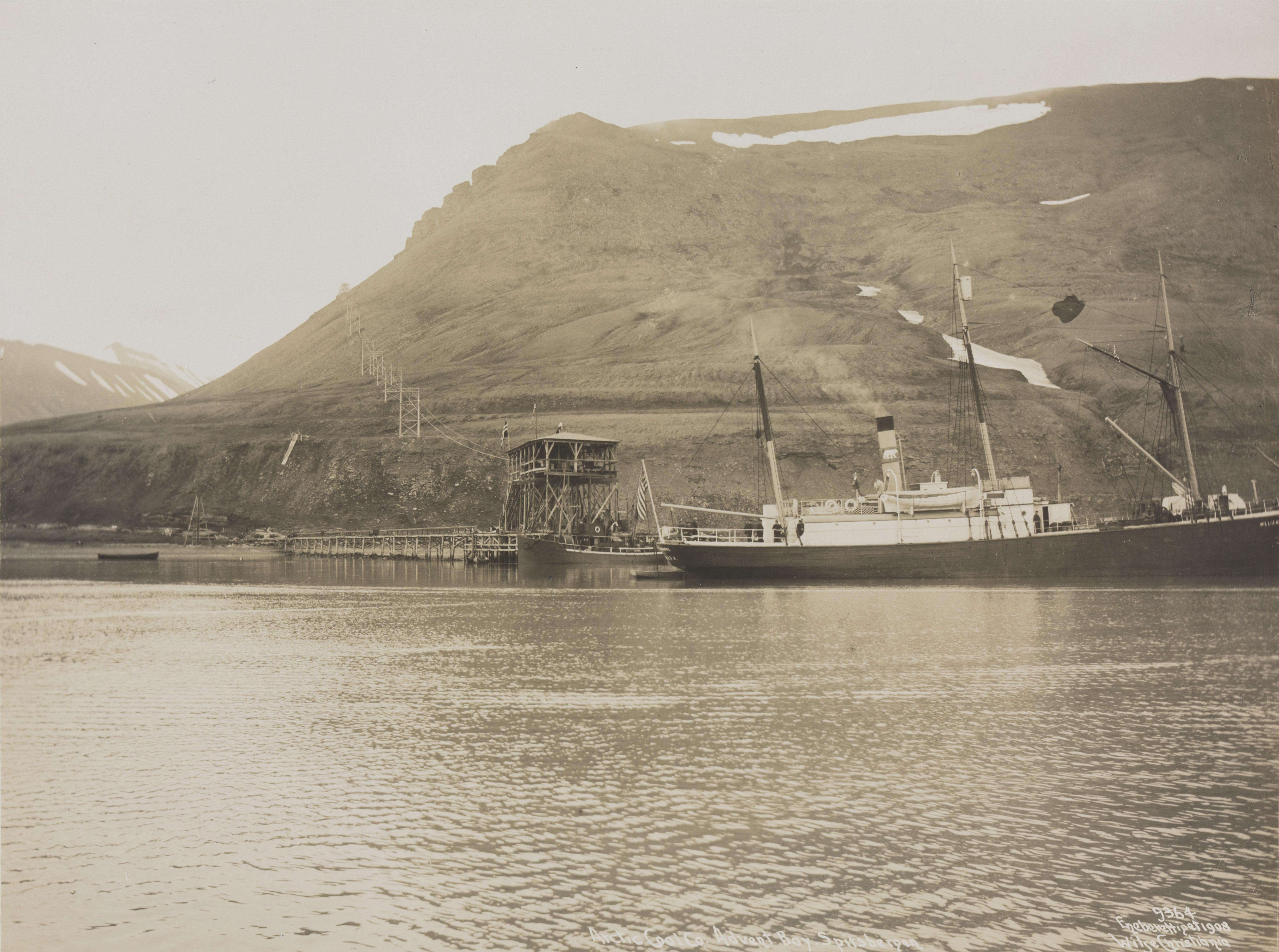 Bildet er hentet fra Nasjonalbibliotekets bildesamling. Anmerkninger til bildet var: Tittelen er fra fotografiets forside. Samme skip som på GH13alb_L03. D/S Wiiliam D. Munroe var eid av Arctic Coal Co.(Ayer & Longyear). Senere en kort tid av Carl. S Sæther. Opplysningene er fra Carl Sæthers album, der det er flere bilder av denne båten. Adventfjorden